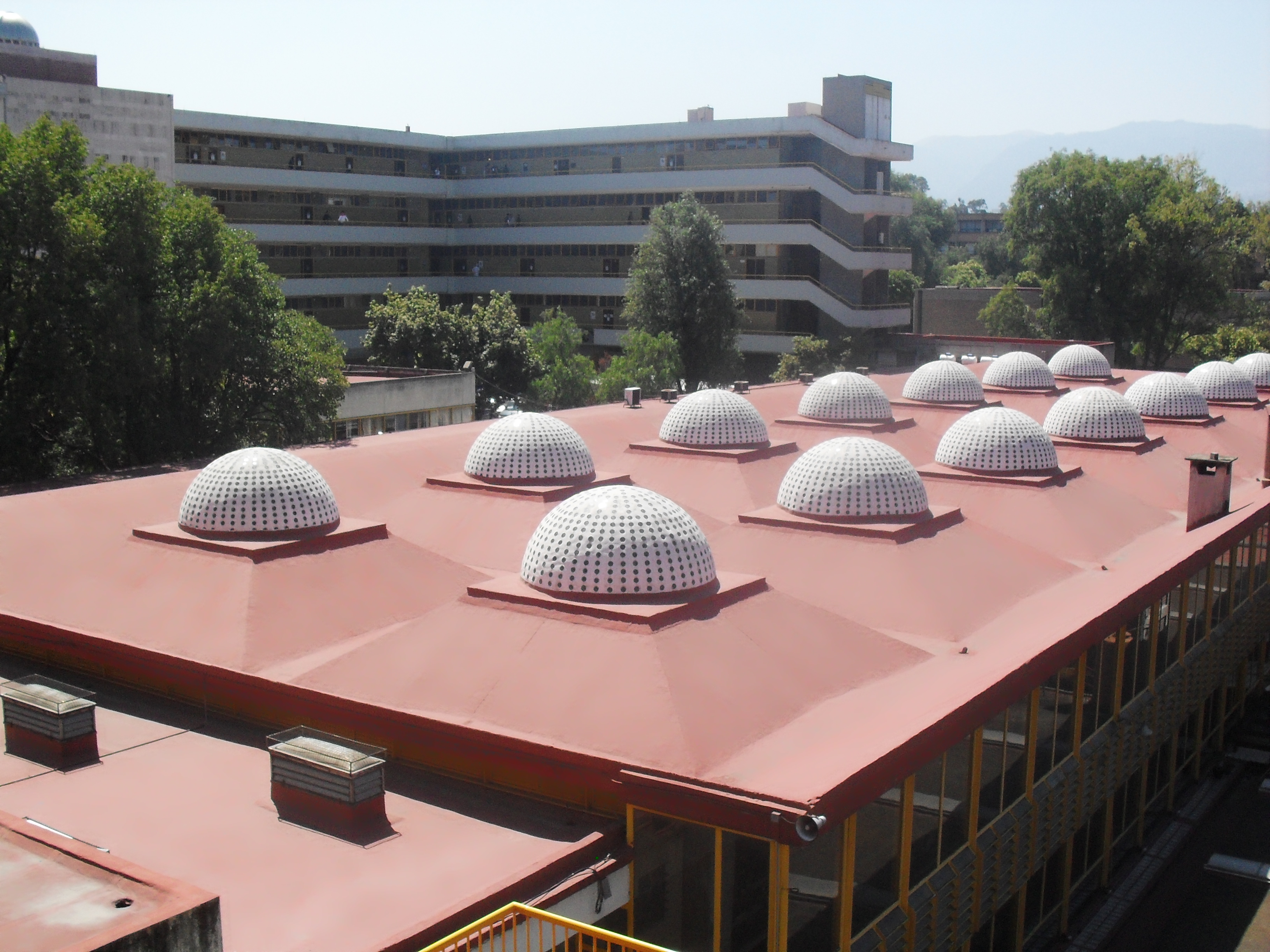 Vista panoramica del resto de los edificios de la Facultad